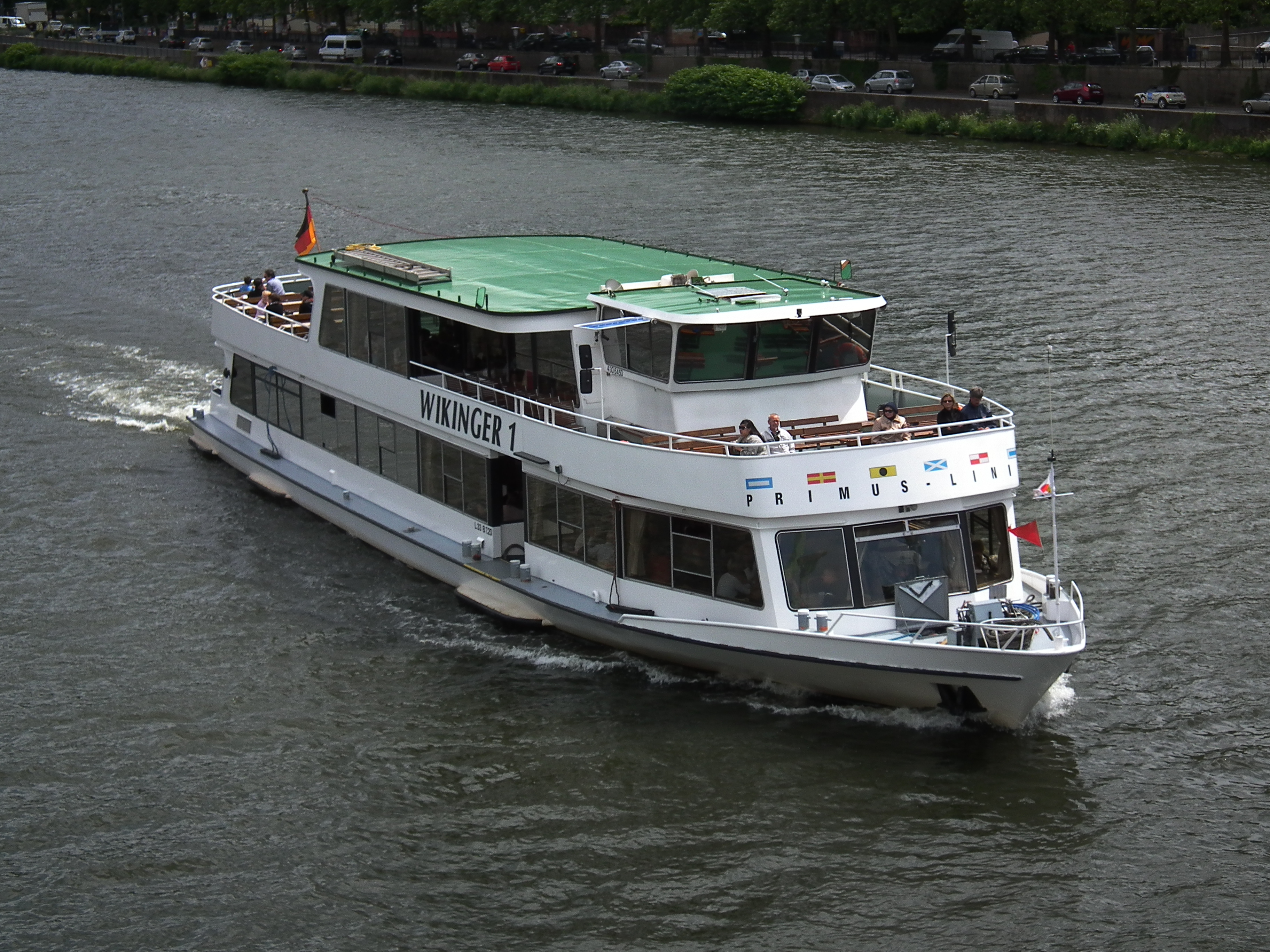 Fahrgastschiff "Wikinger 1" der Primus-Linie auf dem Neckar in Heidelberg (Baden-Württemberg, Deutschland)